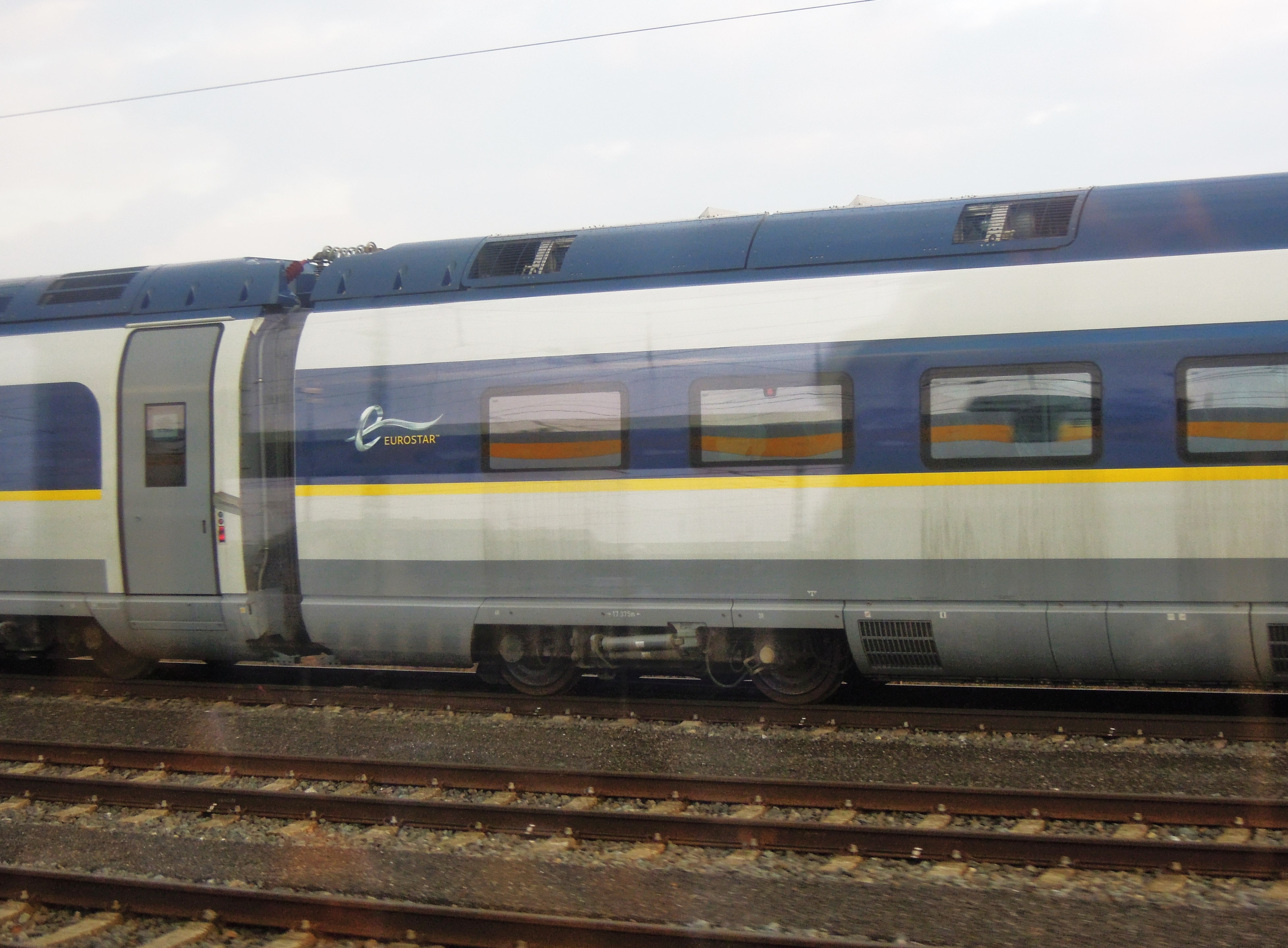 Ein neuer Eurostar-Triebzug von Siemens, Nummer 4002, bei seiner Überführung im Februar 2015.